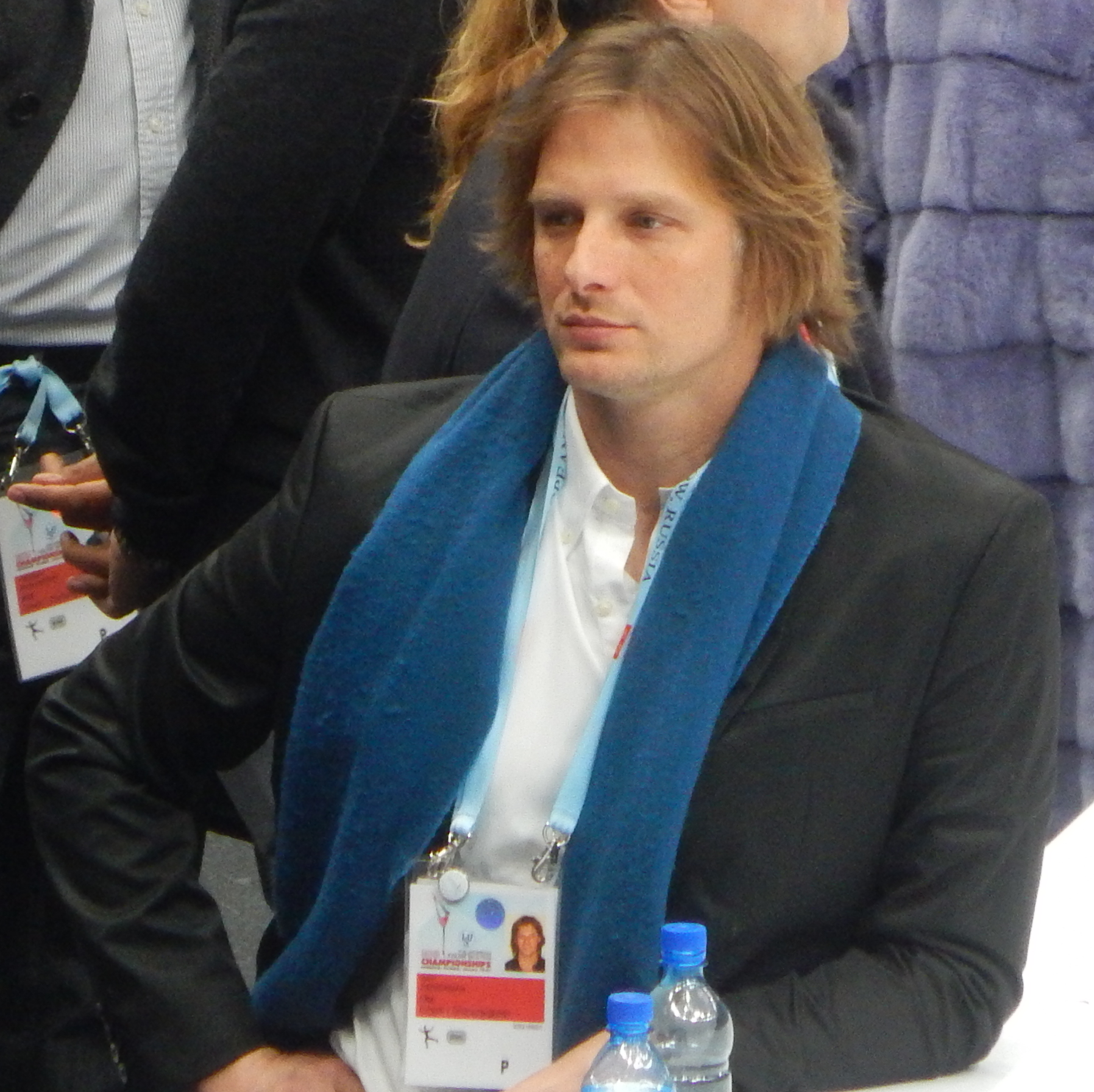 Чемпионат Европы по фигурному катанию 2018 в Москве. Первый день соревнований (17 января). Тренеры у бортика перед началом последней разминки в короткой программе в парном катании